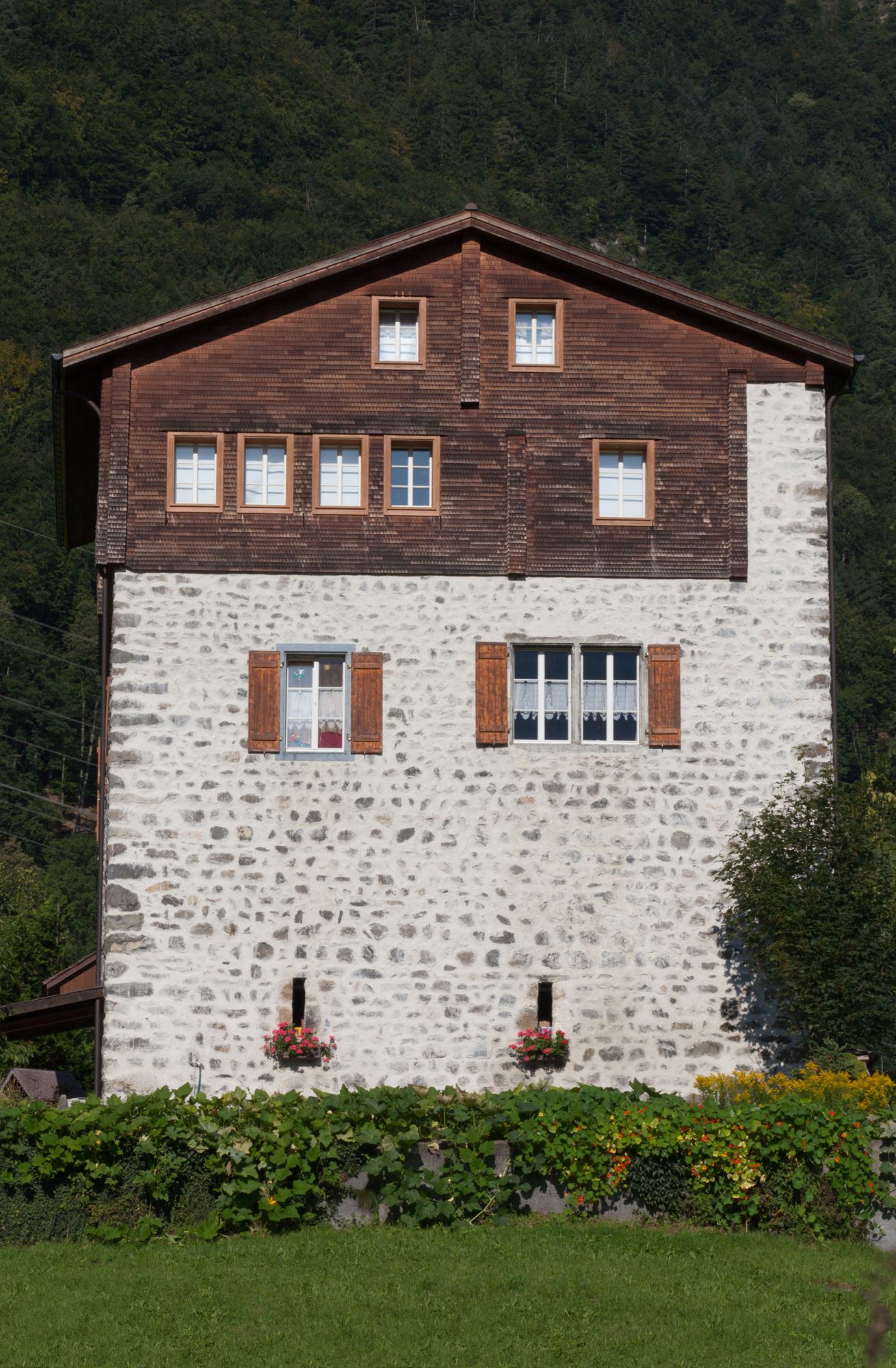 Der Wohnturm Schweinsberg in Attinghausen